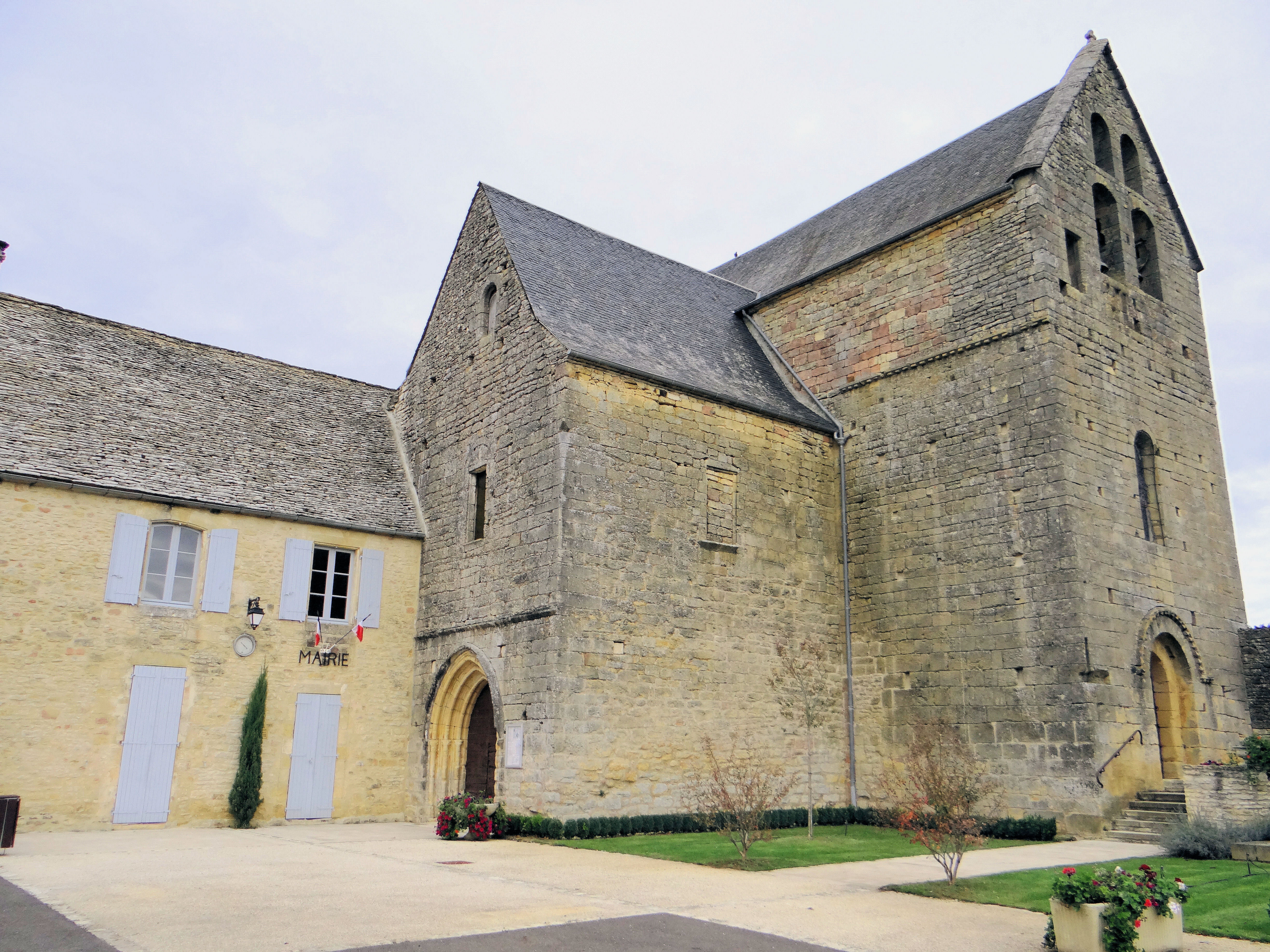 Paulin (Dordogne) - Mairie et église Saint-Pierre-ès-Liens